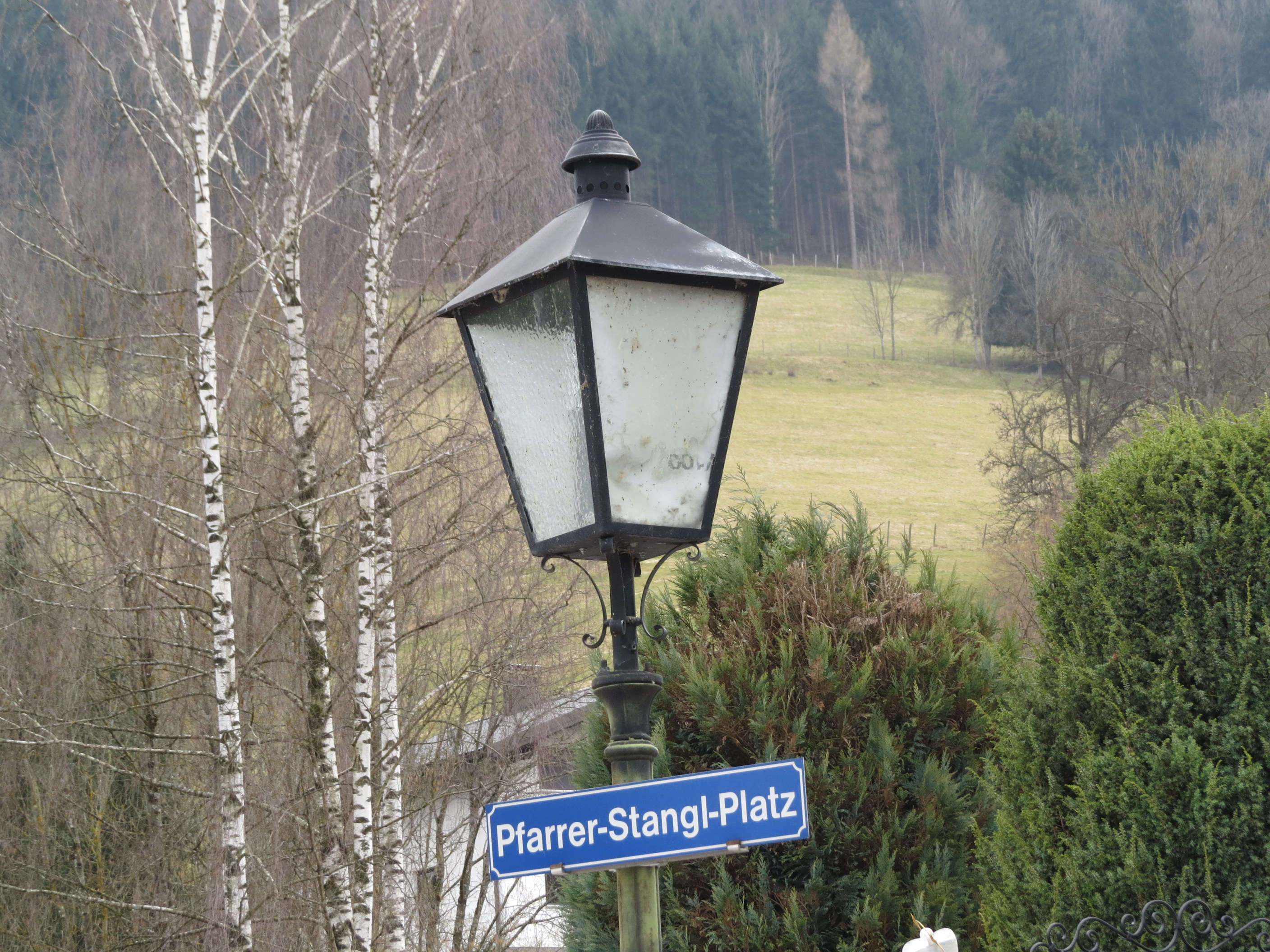 2017-03-17 Frankenfels, Kriegerdenkmal